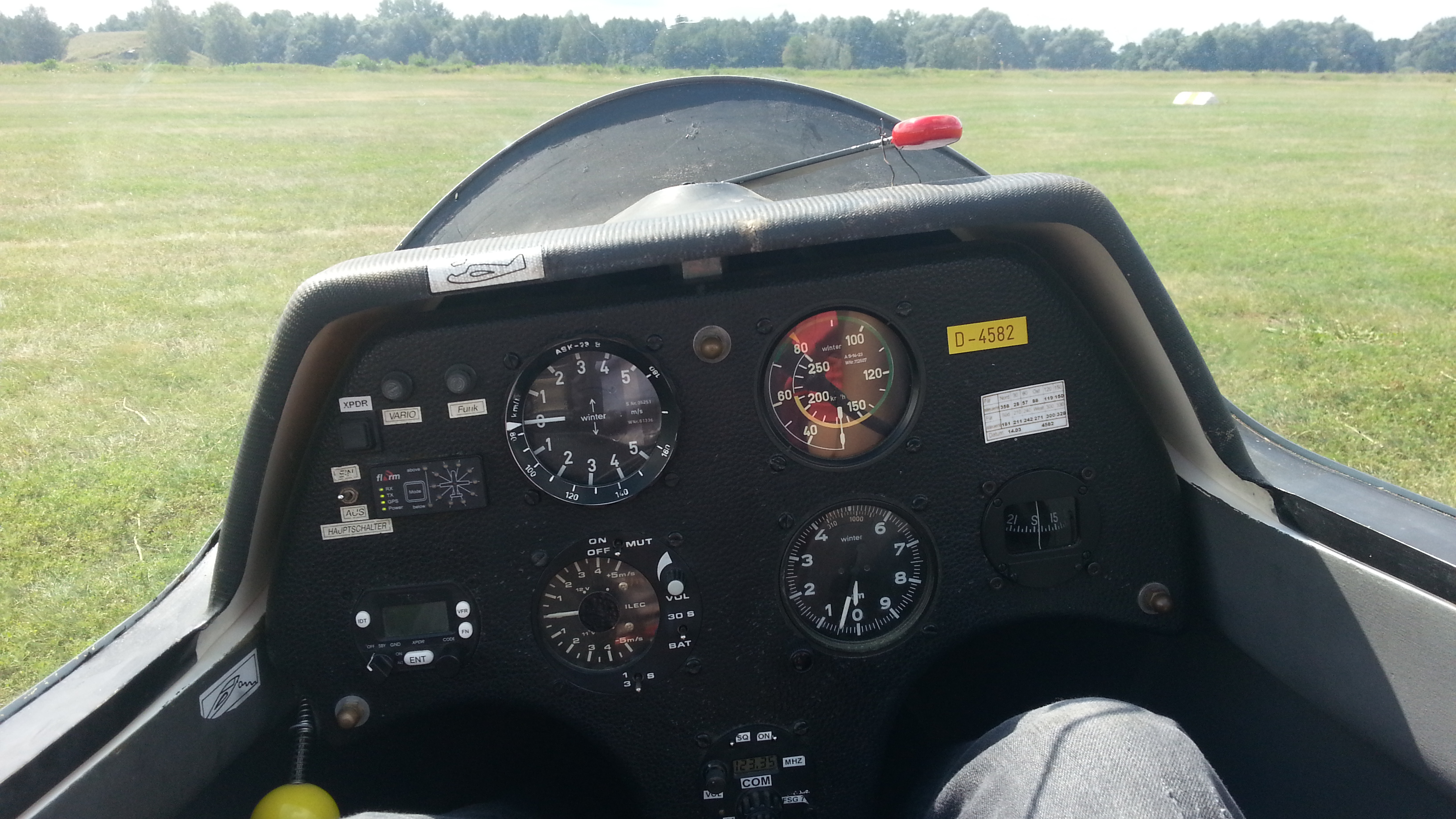 Instrumentenbrett einer ASK 23 B "D-4582". Dieses Bild entstand am Segelfluggelände in Neuruppin. Das Flugzeug ist ein Vereinsflugzeug der Luftsportfreunde Kamen/Dortmund 2000